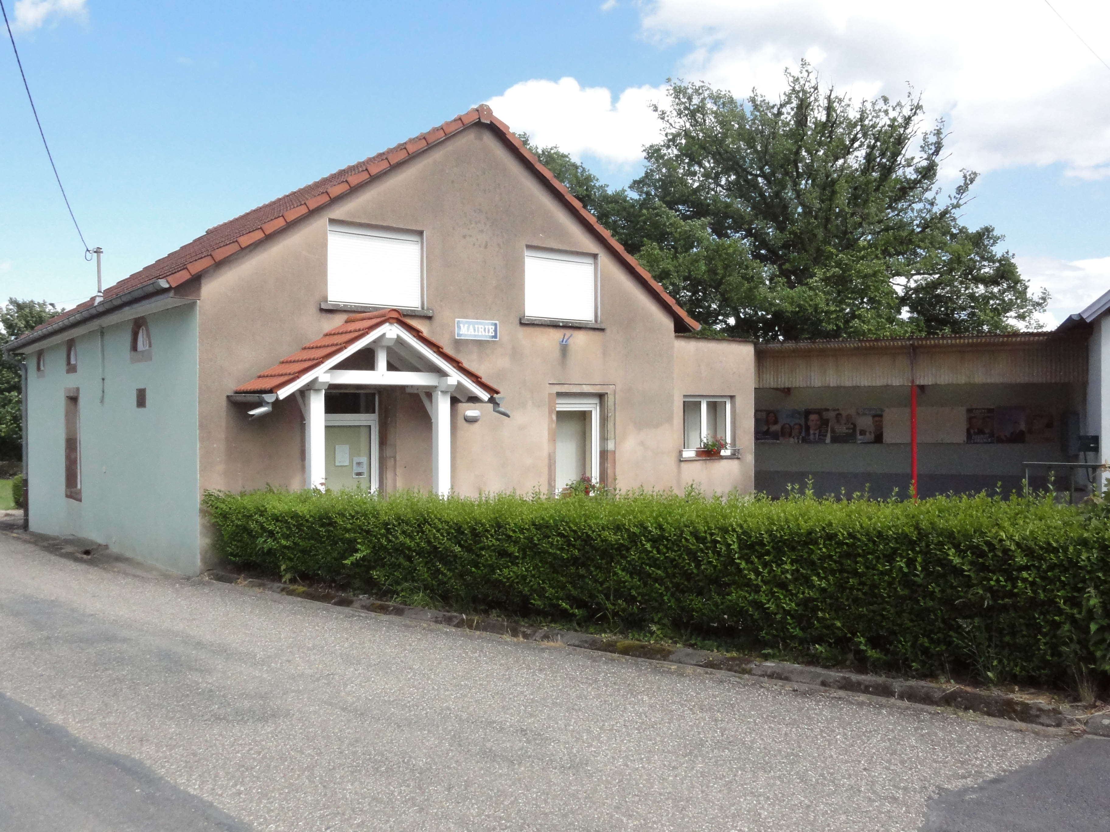 Waltembourg (Moselle) mairie